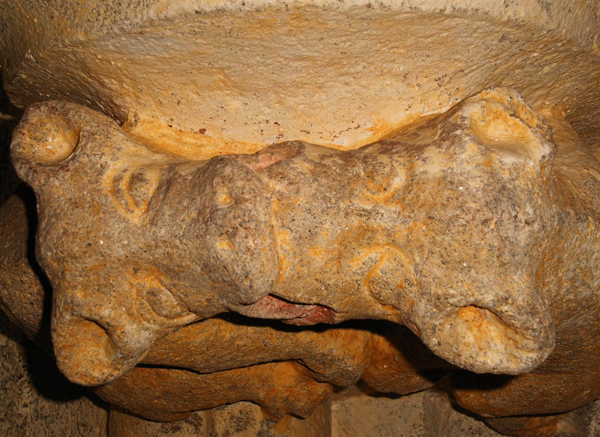 Fuß einer Muttergottes-Statue in Notre Dame de Tronoën / Saint-Jean-Trolimon